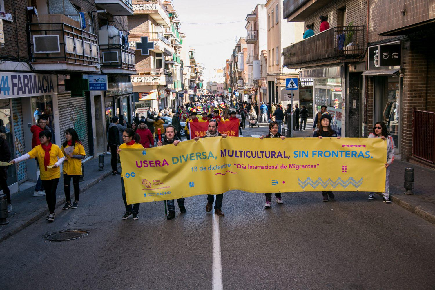 Con motivo del 18 de diciembre, Día Internacional de las personas migrantes, y en colaboración con la Mesa de Inmigración del Foro Local de Usera, la Junta de distrito ha celebrado este año unas jornadas deportivas y culturales con diversas actividades a lo largo de las dos últimas semanas que buscan mejorar la convivencia, tolerancia y diversidad en nuestros barrios. Del 9 al 18 de diciembre el distrito ha acogido competiciones deportivas de fútbol, ping pong, ecuavoley y cross popular para dar ejemplo de valores como el respeto, la igualdad y el trabajo en equipo. Asimismo, mañana lunes 18 a las 18:30h tendrá lugar una mesa de debate sobre las condiciones laborales de las empleadas domésticas, en su mayoría mujeres migrantes en situaciones de gran precariedad, titulada “El trabajo del hogar y cuidados: la aportación de las personas migradas en la sostenibilidad de la vida”.